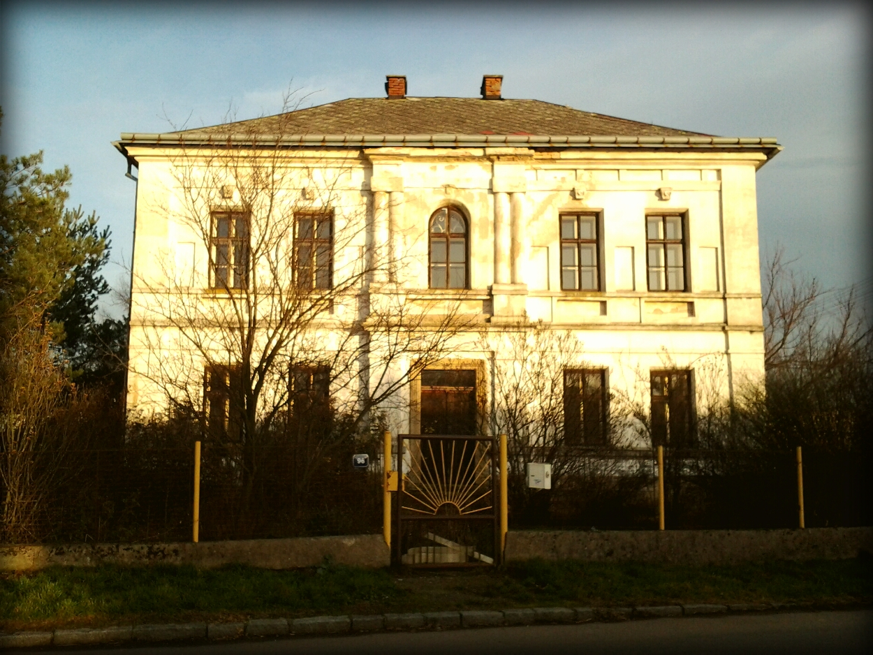 Zámeček Staré Ždánice (podzim)